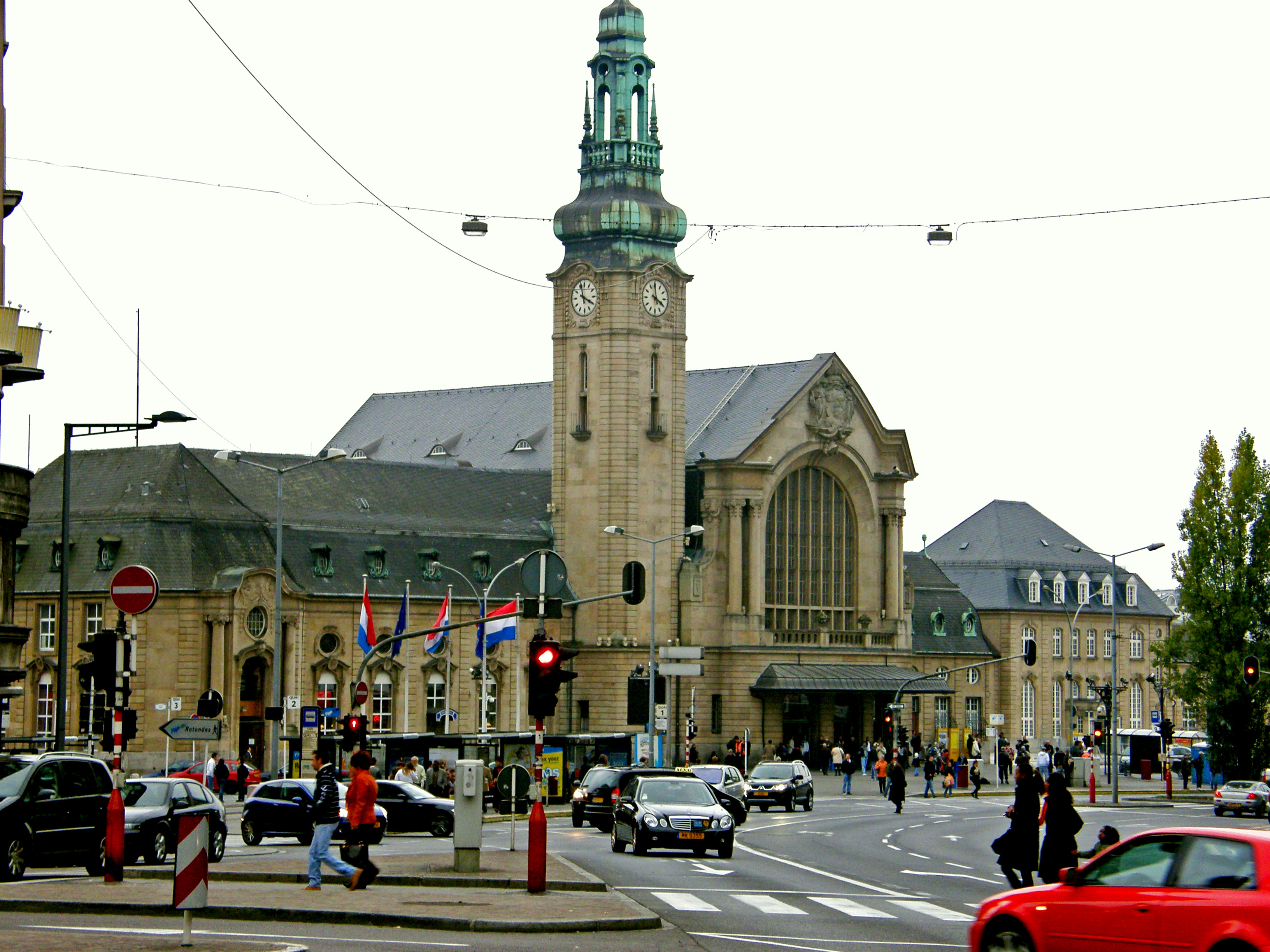 Gare Stad.